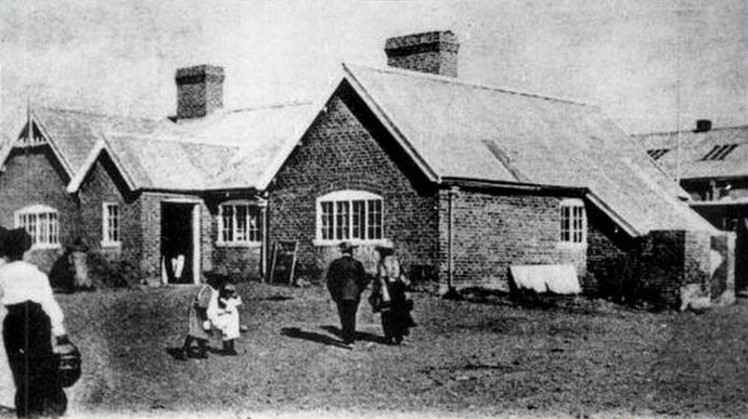 Estación de Trelew hacia el año 1900, foto presente en el Museo Pueblo de Luis